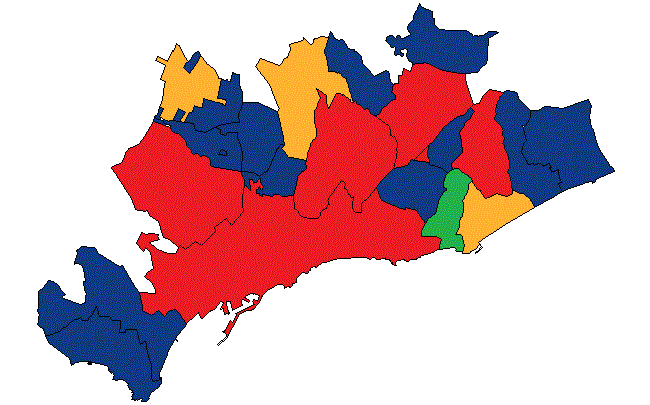 !Template:Llegenda}